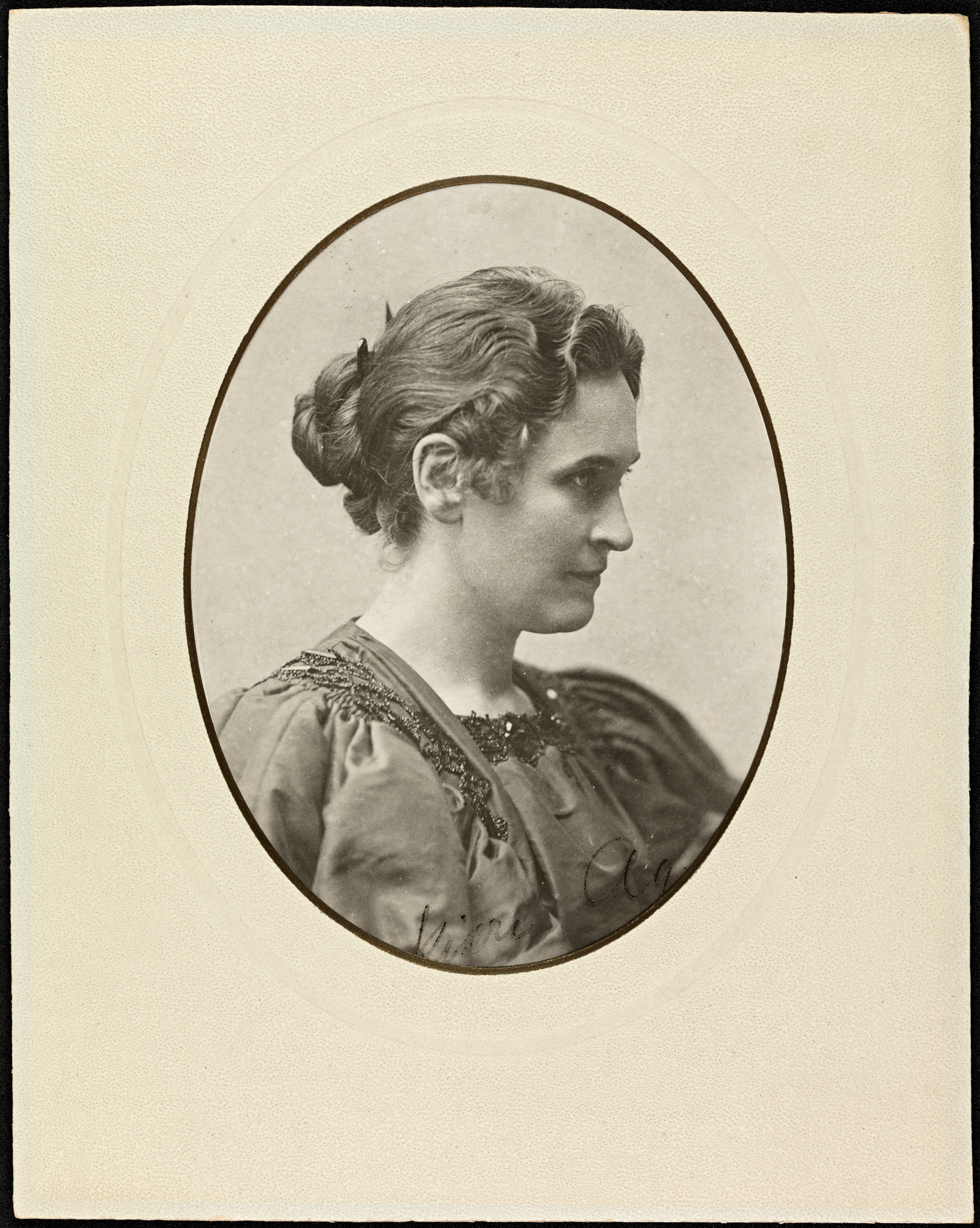 Tittel / Title: Portrett av Hildur Schirmer (1856-1914) Beskrivelse / Description: Hildur Schirmer var kvinnesakskvinne, sanger og sanglærer. Gift med arkitekt Adolf Schirmer. Dato / Date: ukjent / unknown Fotograf / Photographer: ukjent / unknown Eier / Owner Institution: Nasjonalbiblioteket / National Library of Norway Lenke / Link: Bildesignatur / Image Number: blds_05830